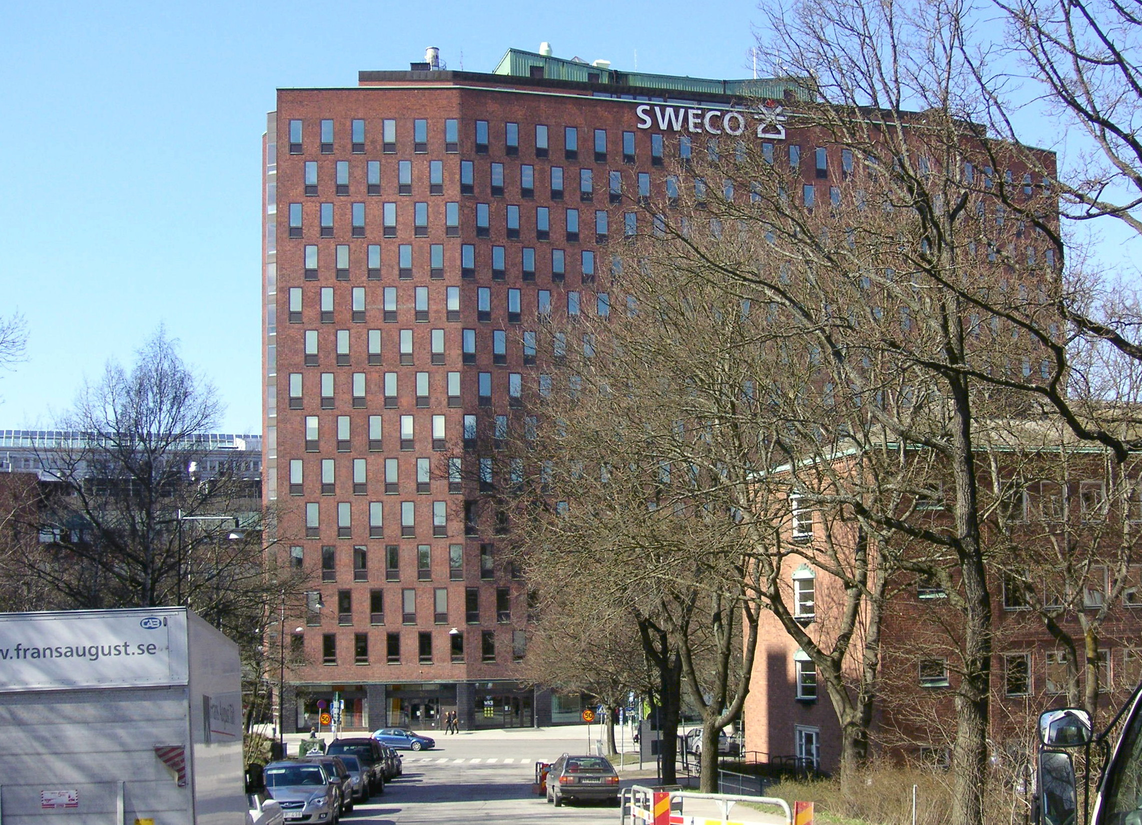 Anders Tengbom, byggnad för "Svenska Dagbladet" in Stockholm